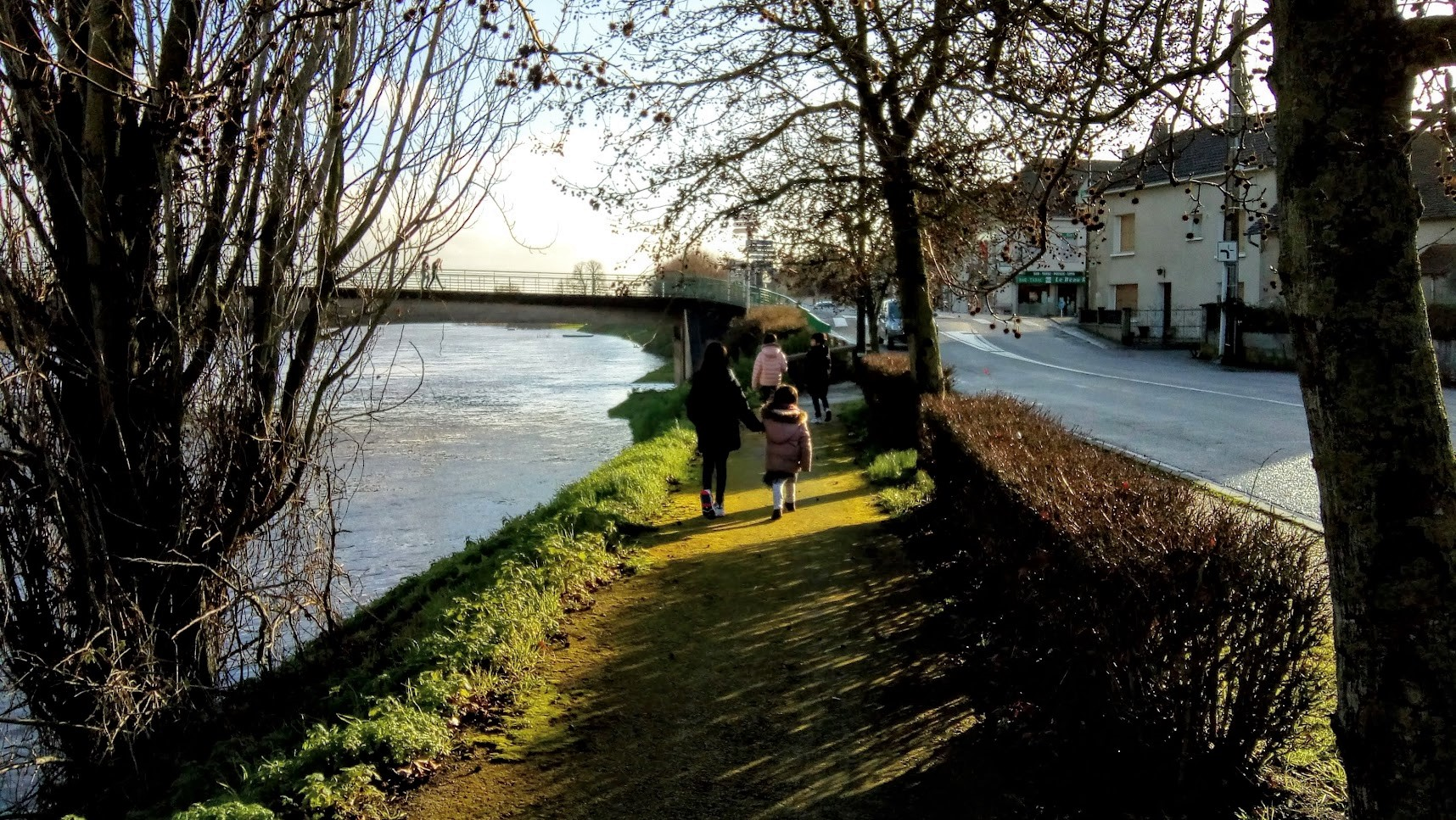 Vue du chemin piétonnier situé rue de la Vienne